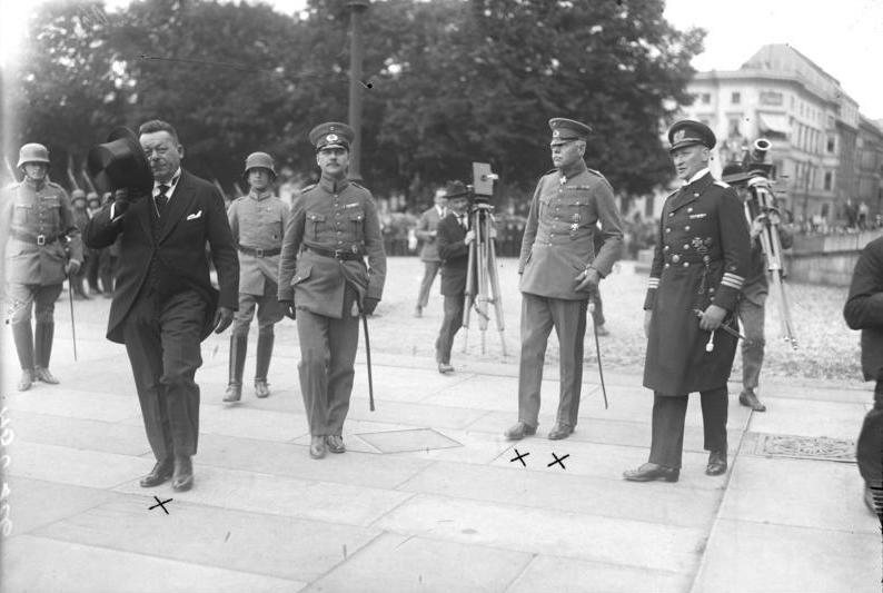 Zum Regierungssturz in Bayern. Reichspräsident Ebert (X) und der Oberbefehlshaber Seeckt (XX) anlässlich einer Parade. General Ludendorff, der neue Oberbefehlshaber in Bayern beim Abnehmen einer Parade der nationalen Armee. [Foto zum 9.11. 1923 neu heraugegeben; von Seeckt und Ludendorf nicht auf dem Foto]